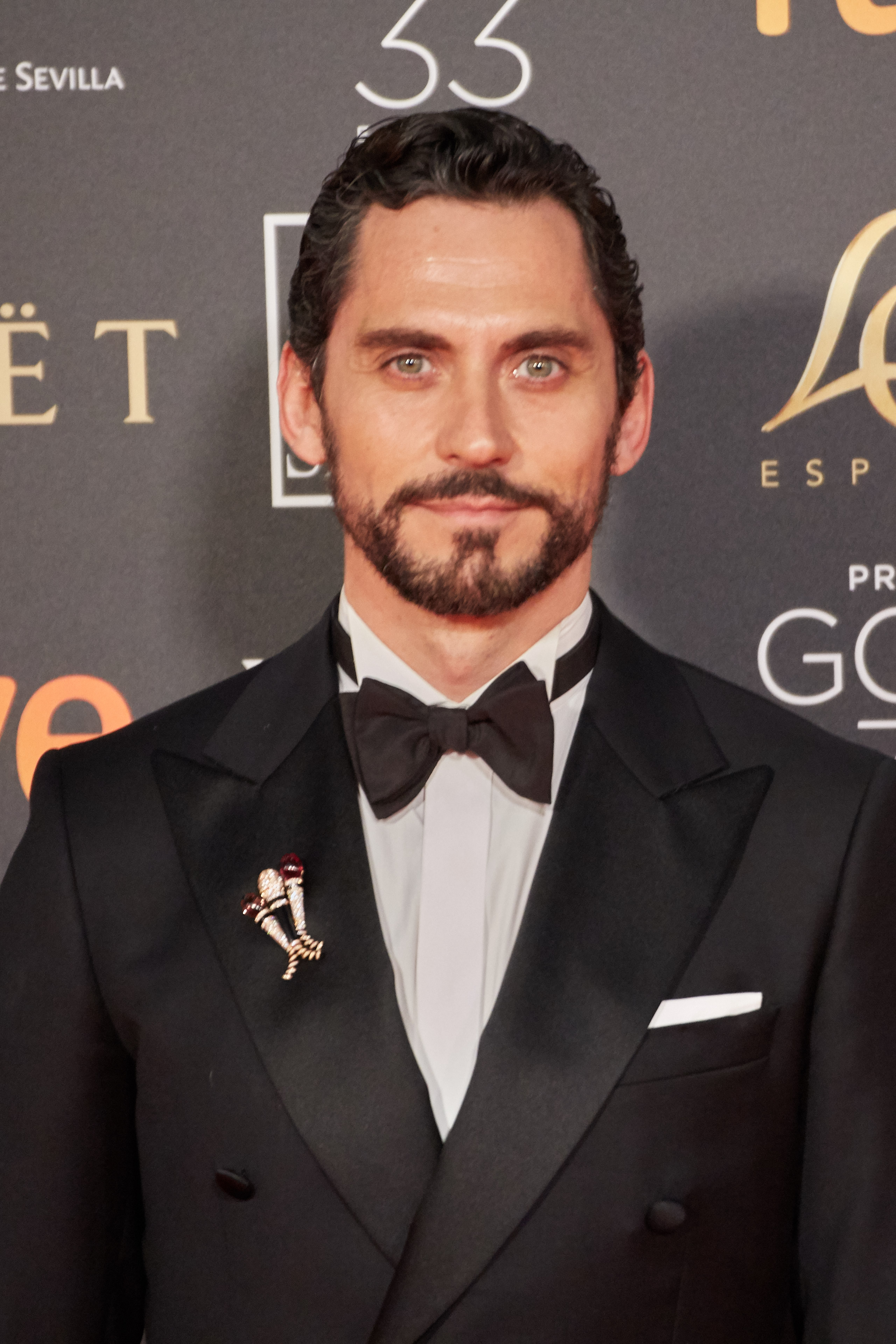 Paco León en la alfombra roja de los Premios Goya celebrados en Sevilla en Febrero 2019